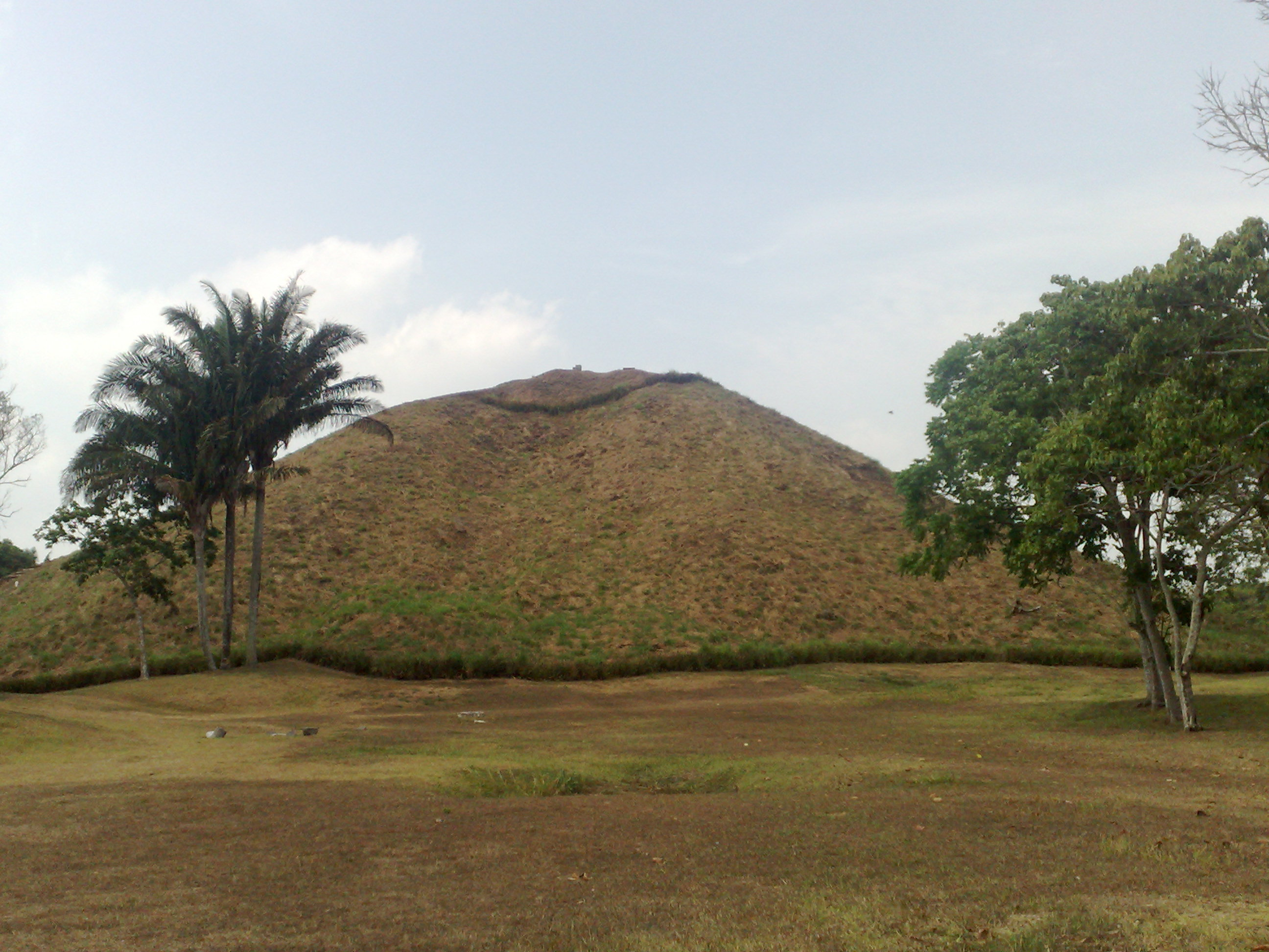 Cara norte de la pirámide de La Venta (Olmec), Tabasco, México.